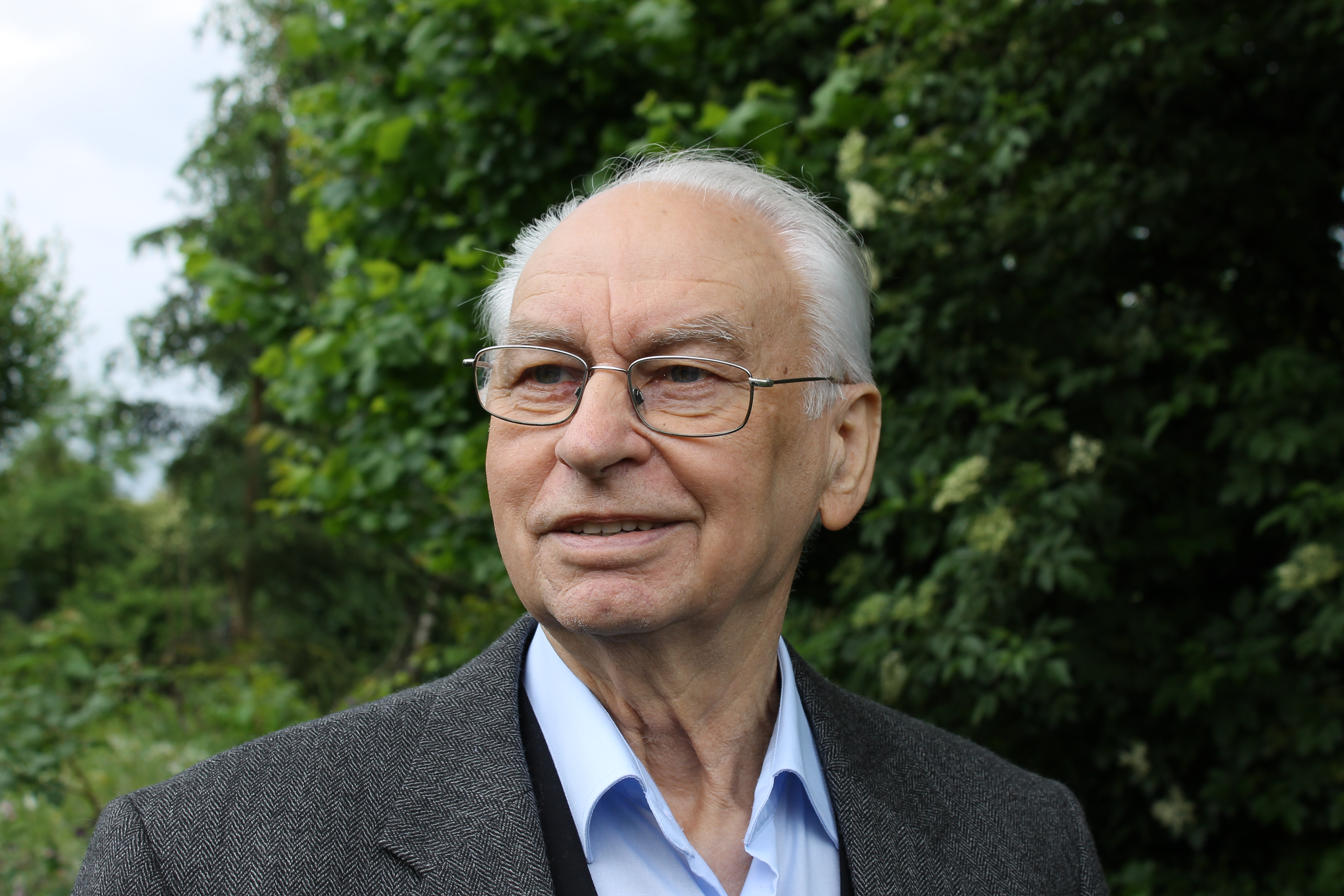 Foto von Eberhard Gabler